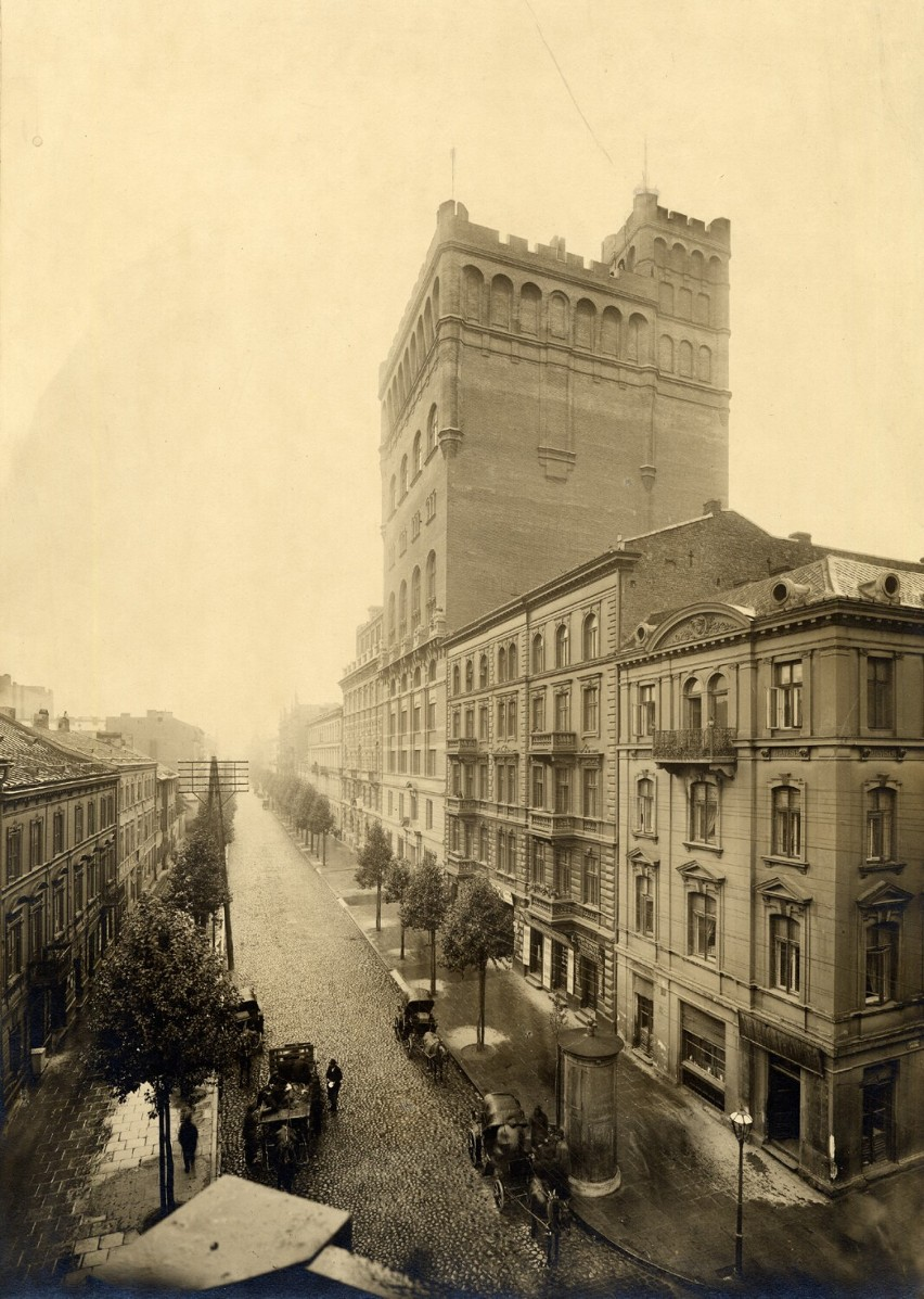 Budynek Polskiej Akcyjna Spółki Telefonicznej (Warszawa)